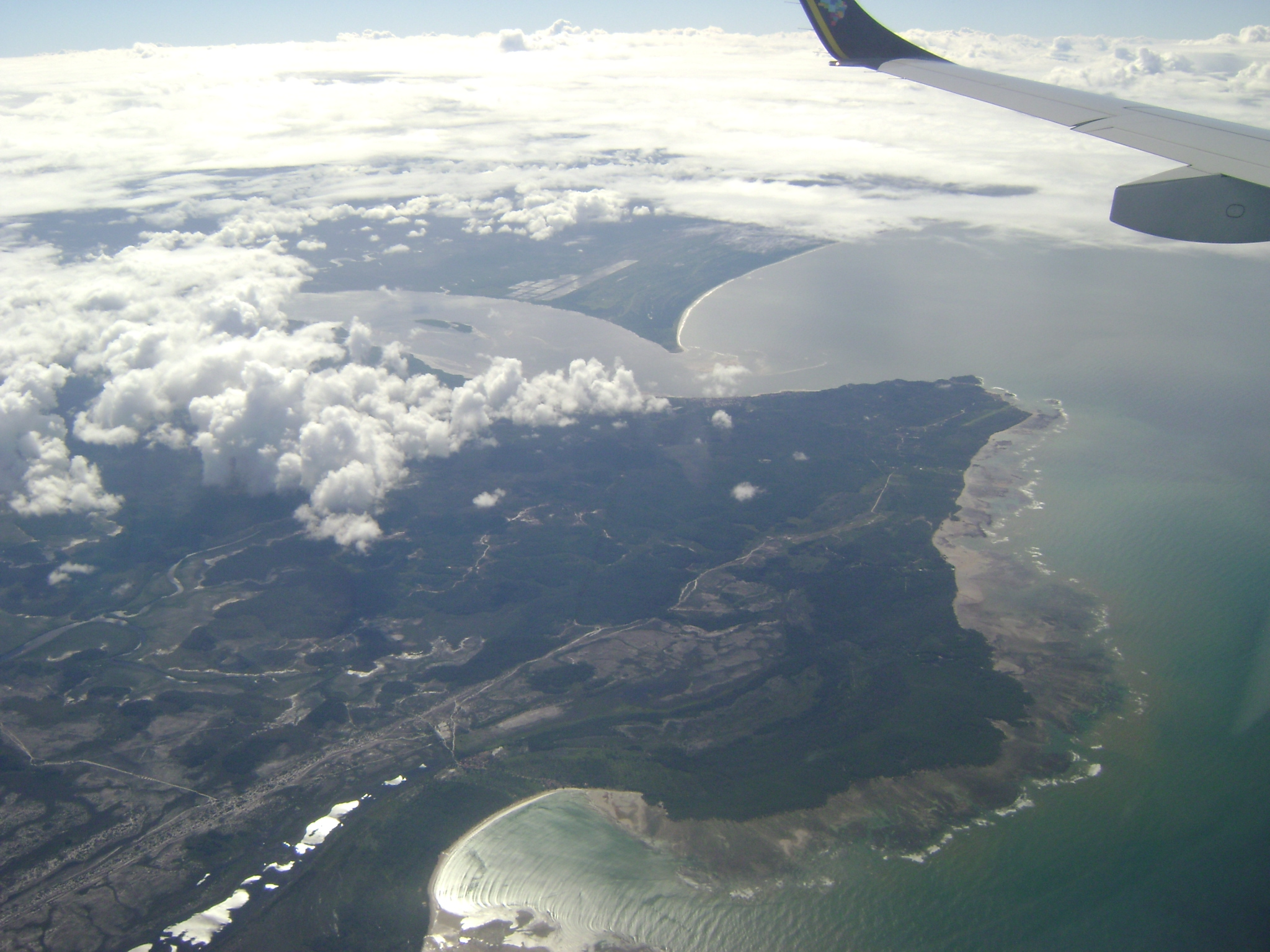 Ilha de Tinharé e foz de um rio vista de um avião, próximo ao município de Valença, Bahia, Brasil.